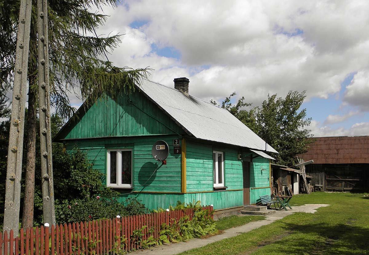 Kacprowice 3